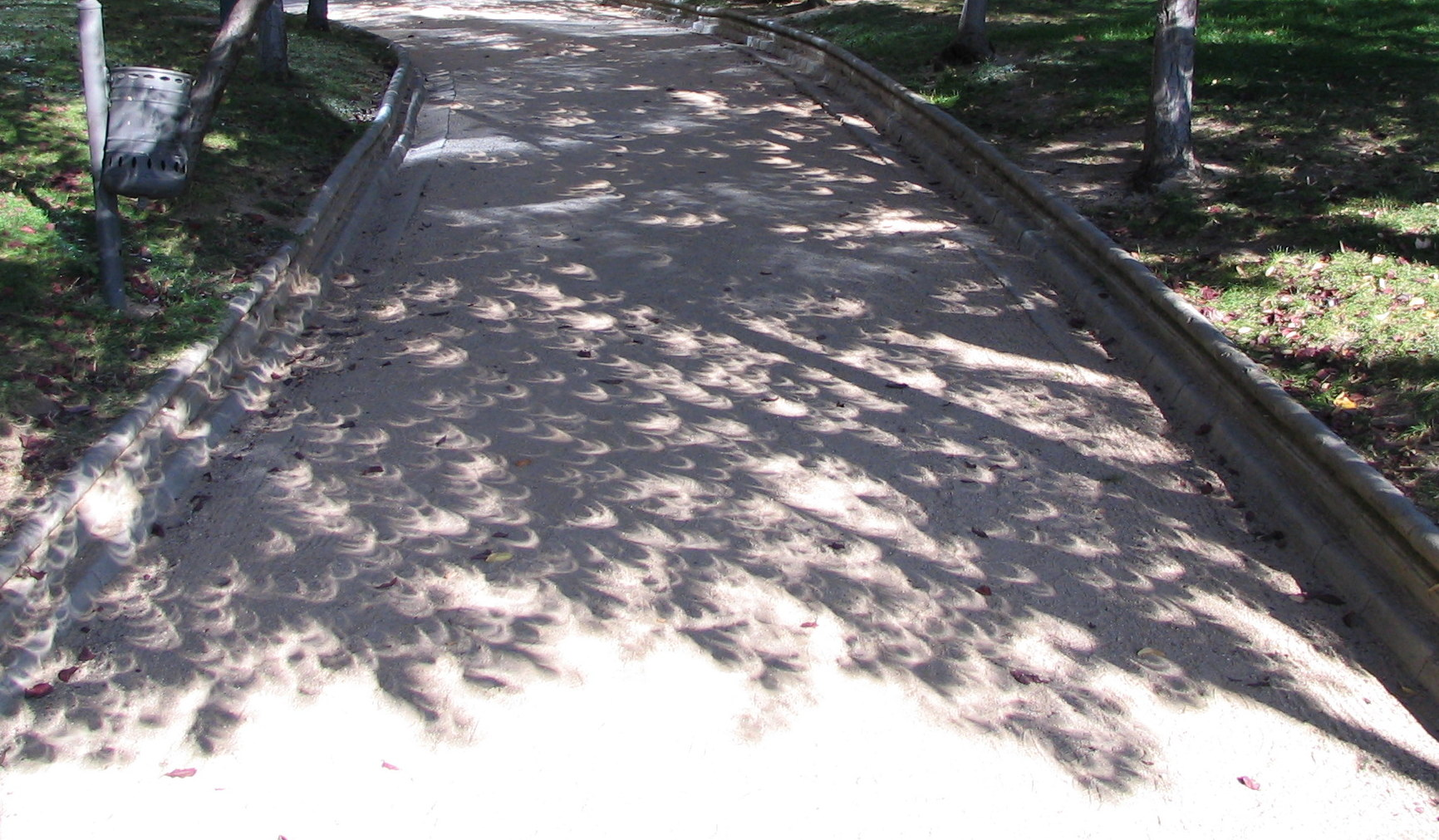 Detalle de la sombra de las hojas proyectada durante el eclise. Eclipse de Sol total desde Móstoles (Madrid, España)